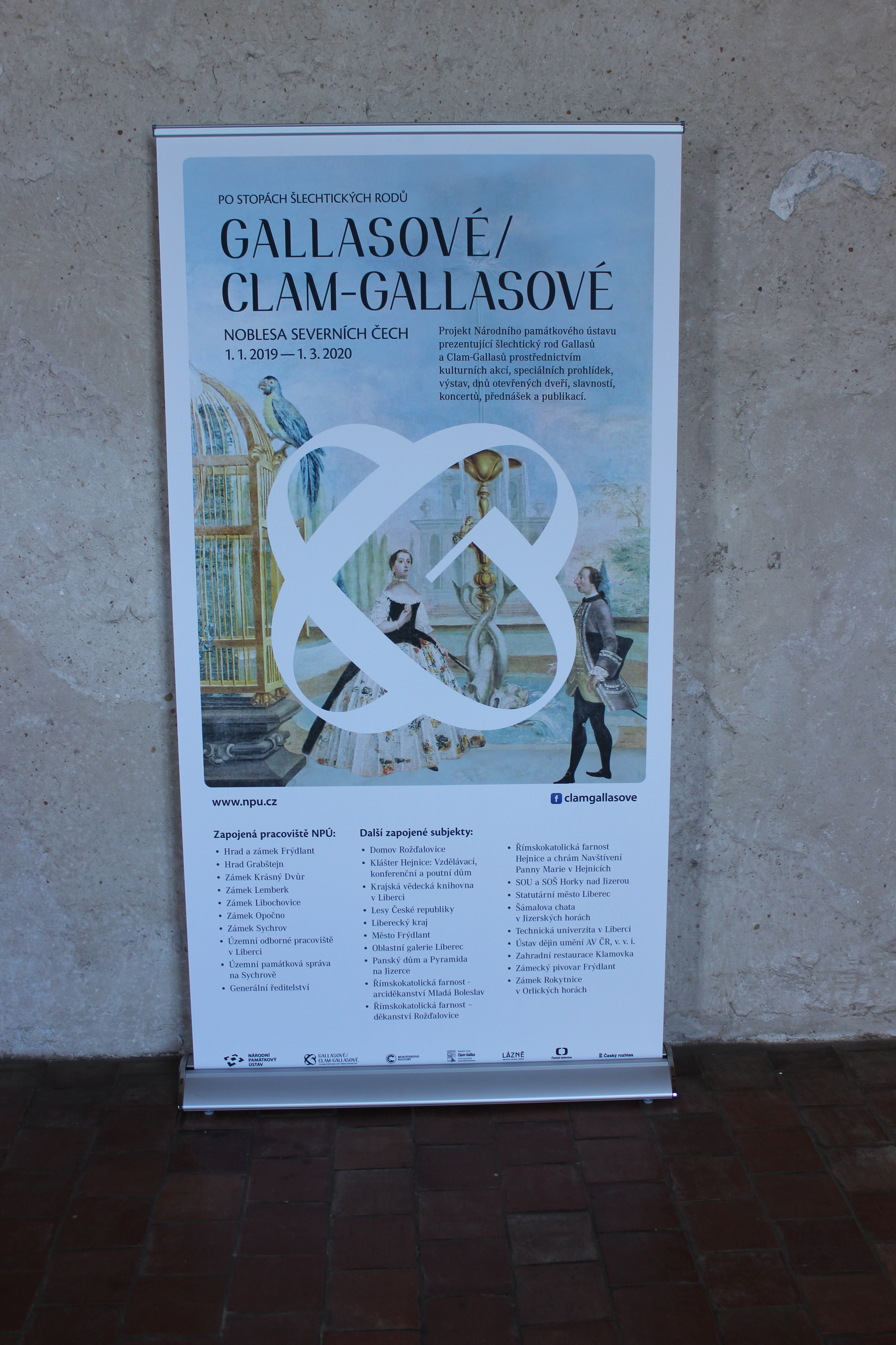 Plakát Gallasovského a Clam-Gallasovského roku v paláci hradu Bezděz.